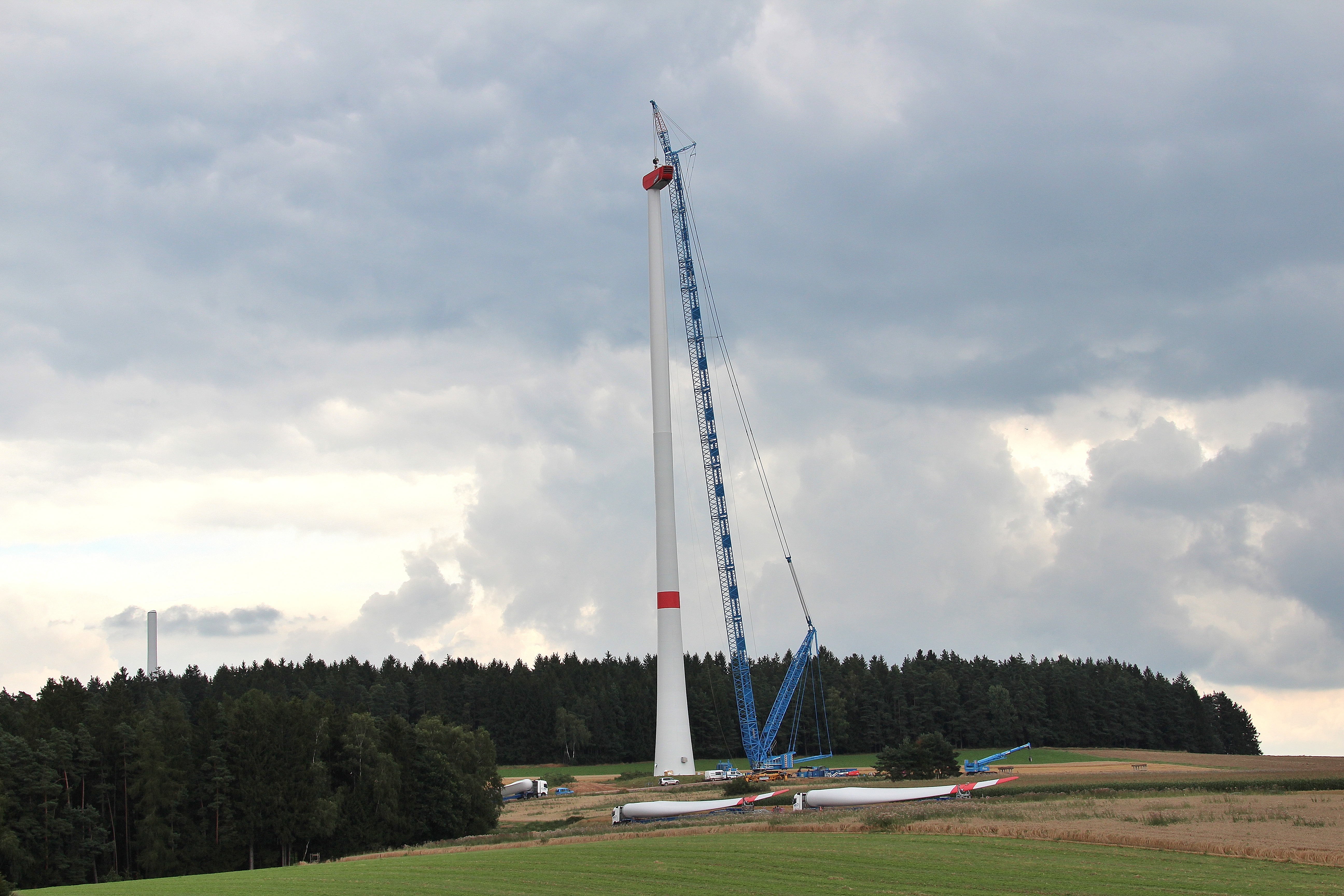 Das Maschinenhaus (Typ Nordex) der WEA 01 im Windpark Pamsendorf wird auf dem 140 Meter hohen Turm montiert. Im Maschinenhaus, auch Gondel genannt, sind der Triebstrang, ein Teil der elektrischen Ausrüstung, die Windrichtungsnachführung, die Rotorkopflagerung sowie Hilfsaurüstung wie z. B. Kühlsysteme, Elektronik usw. untergebracht: Windpark Pamsendorf, Stadt Pfreimd, Landkreis Schwandorf, Oberpfalz, Bayern